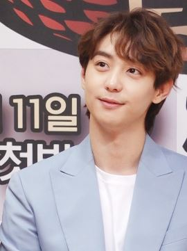 배우 현우가 10일 오후 서울 양천구 목동 SBS에서 열린 '정글의 법칙 in 로스트 정글' 제작발표회에 참석했다.